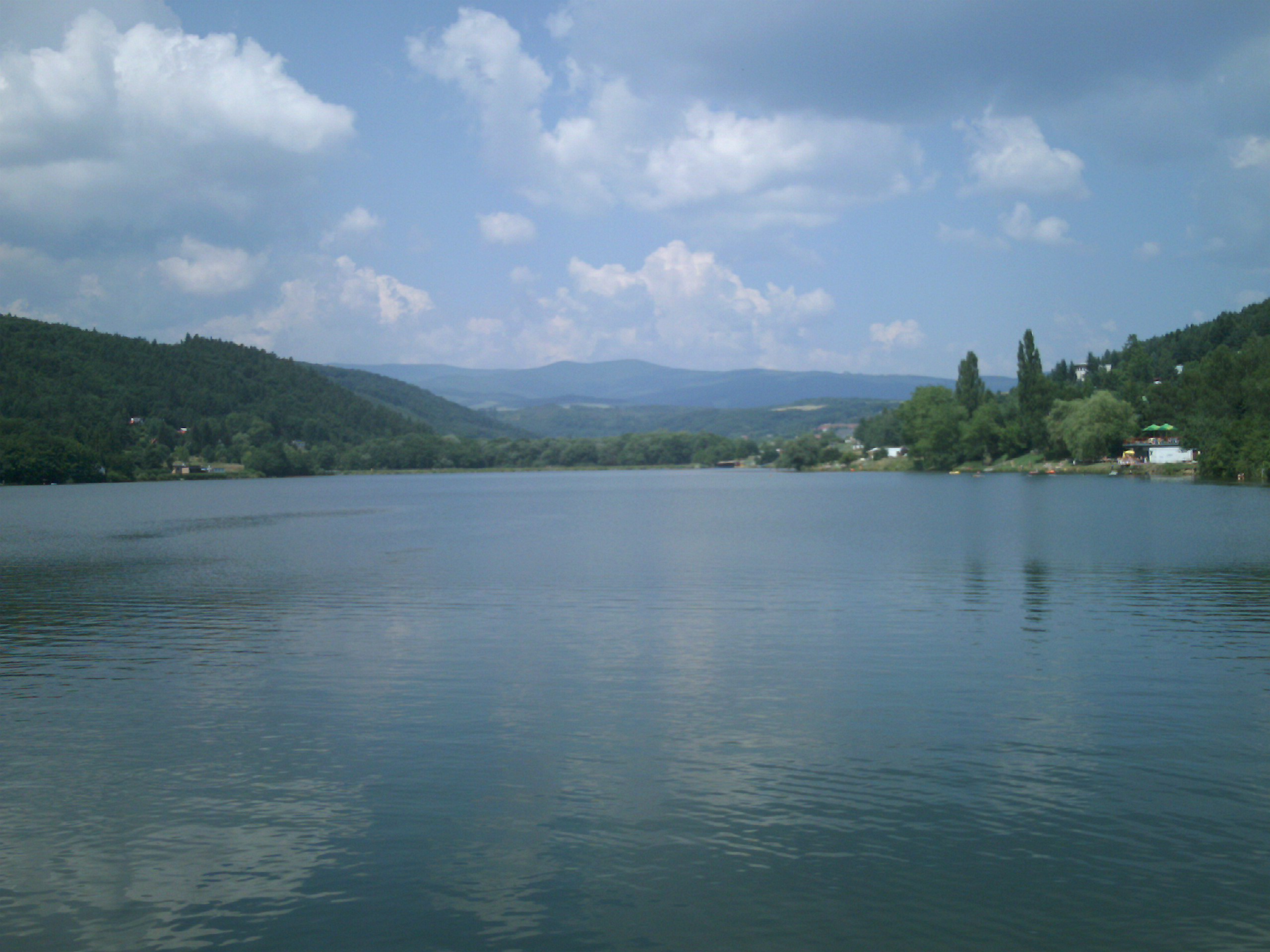 Slovakia_Kosice_Bukovec-lake